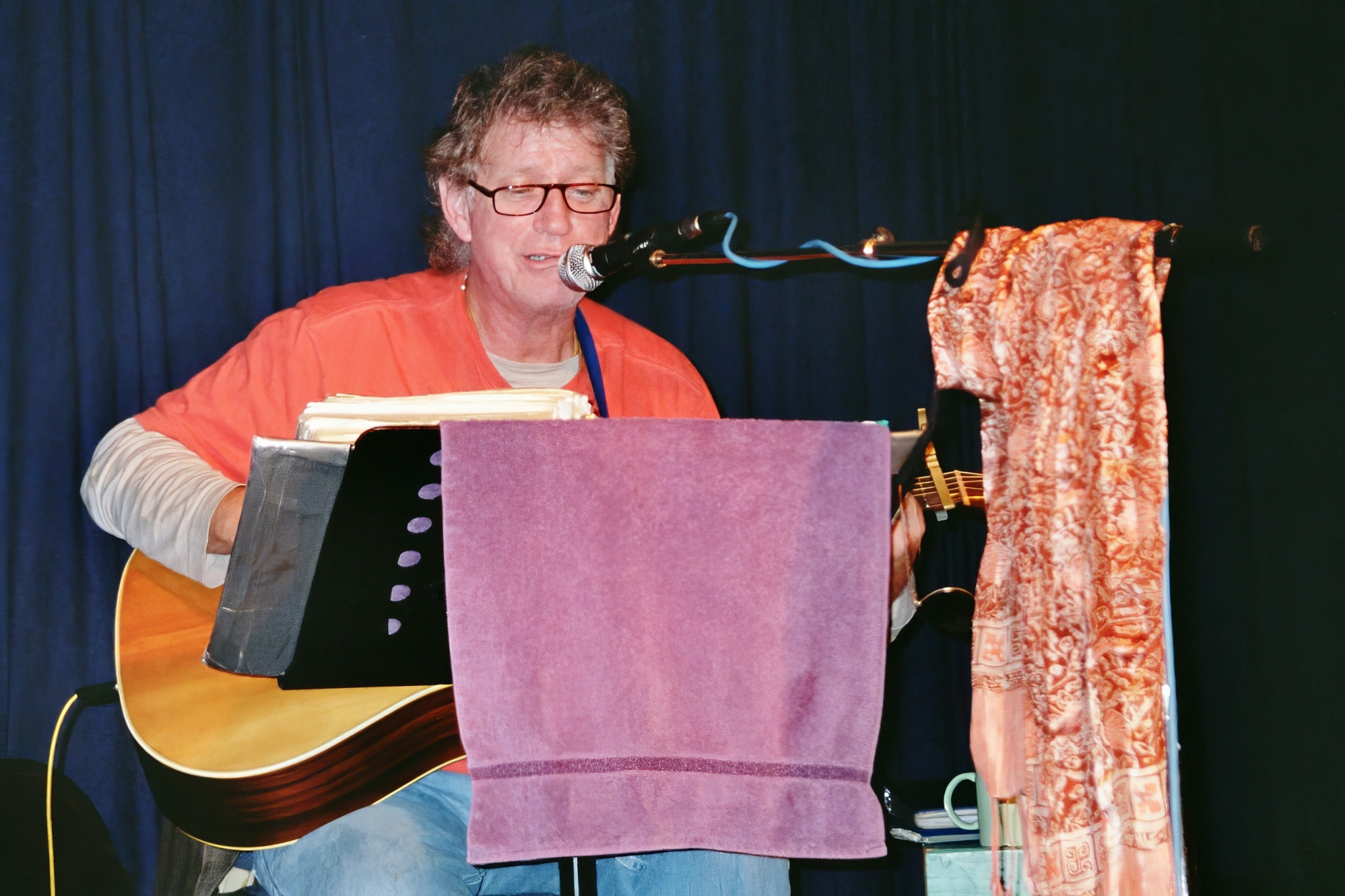 Singer-Songwriter David Munyon am 12. September 2005 im "Café Nova" in Essen.